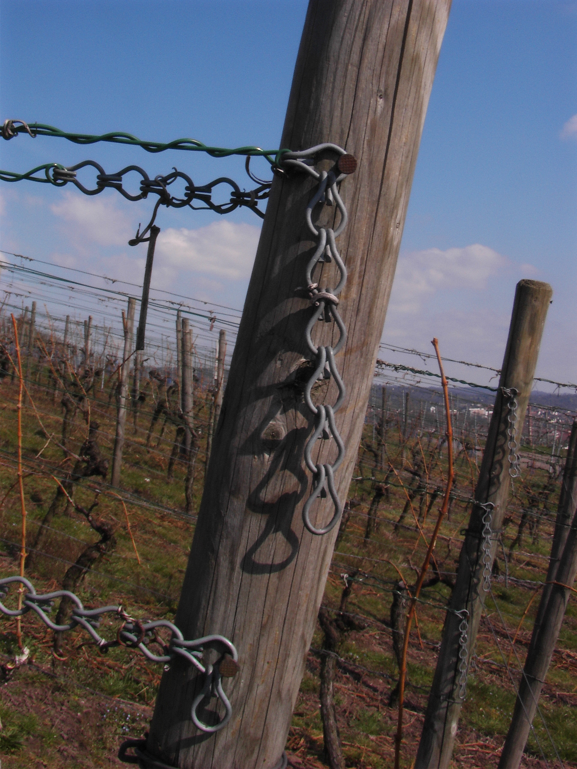 Spannstickel, Nagelstift und Heftkette zum Spannen des Spalierdrahtes im Weinbau